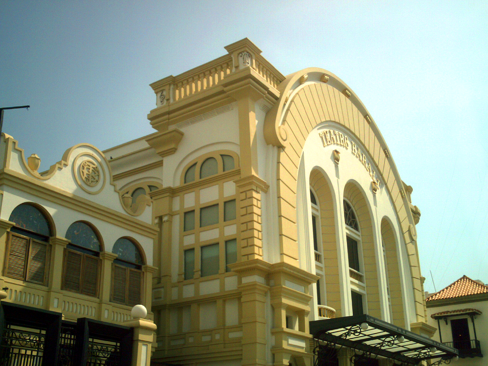 El teatro Baralt fue el primer escenario donde se proyectó una película cinematográfica en el país, el 11 de julio de 1896.[20]. La actual sede del teatro Baralt fue construida entre 1930 y 1932, y restaurada a partir de 1985.